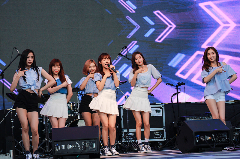 ✔일시 - 8.31(금) 오후 6시 ✔장소 - 홍대걷고싶은거리 (홍대입구역 4번출구) ✔라인업 - 데이브레이크, 소란, 에이프릴, 오리엔탈쇼커스 ✔제주항공X루나와 함께하는 K-POP 댄스리그 결승전 18시에 행사 시작인데 1시간전쯤 홍대역에 도착했습니다. 150석 정도의 좌석에 30여석 정도 빈자리가 남아있었는데 대부분 물병이나 가방 등으로 자리를 맡아놓은 것이었습니다. 18시가 조금 넘어 에이프릴(멤버 : 윤채경, 김채원, 이나은, 양예나, 레이첼, 이진솔) 공연으로 행사가 시작되었습니다. 20분정도의 공연이 끝나고 K-POP 댄스리그 결승전이 있었습니다. 커버댄스 공연이었는데 한팀이 여러개의 곡을 보여주었습니다. 에이티나인 EchoDance HK - 홍콩에서 온 팀이었습니다. HACKER crew ONOFF - 유일한 남자팀이었습니다. 댄스리그 결과및 나머지 공연도 못보고 돌아왔습니다. ^^ 상이 4개라서 전부 하나씩 받았을텐데 검색을 해도 에이티나인팀이 루나 뷰스타상을 받았다는 것 외에 다른 팀 결과를 찾기 어렵네요.